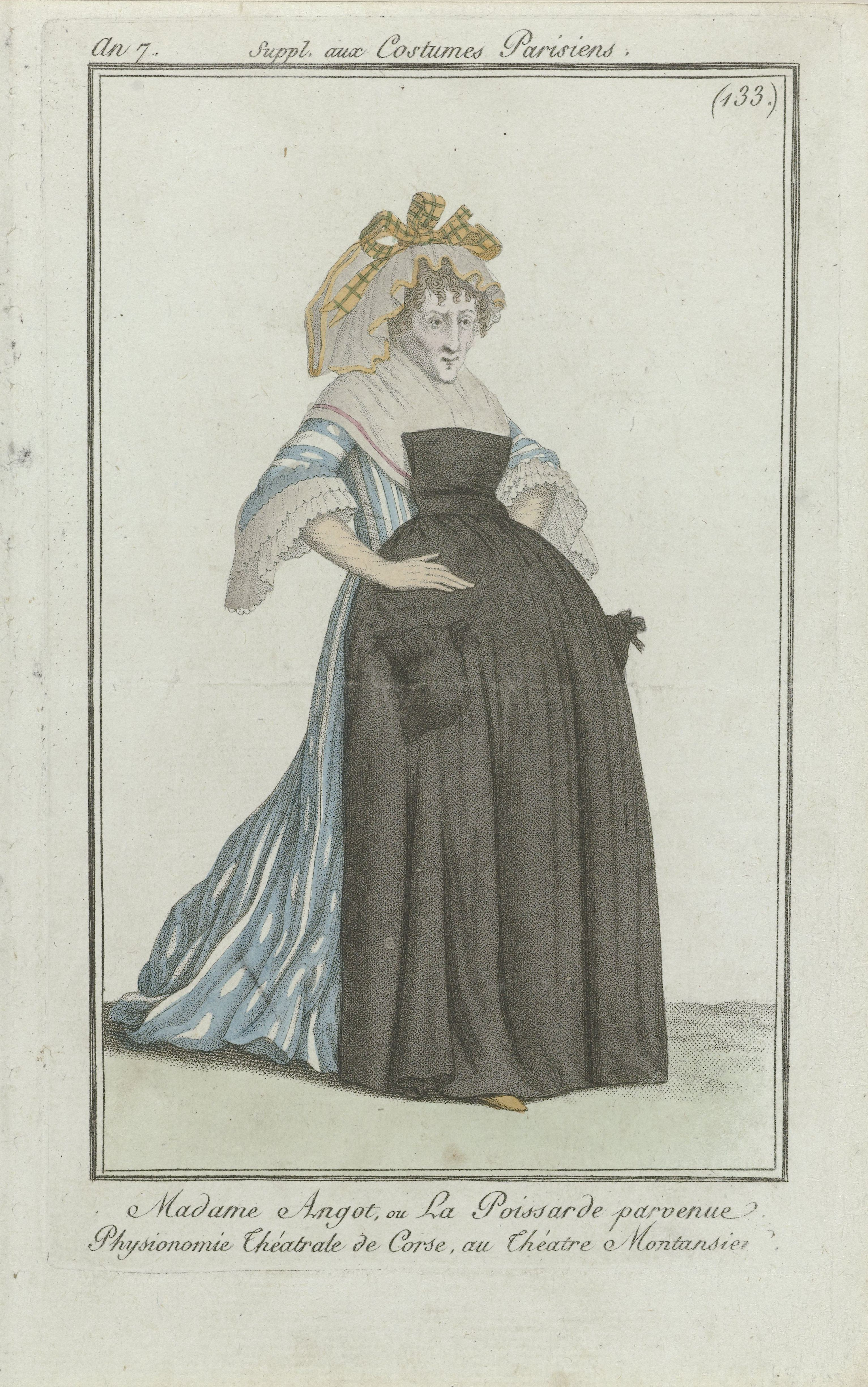 IdentificatieTitel(s): Journal des Dames et des Modes, Suppl. aux Costumes Parisiens, 1799, An 7 (133) : Madame Angot (...)Objecttype: modeprent Objectnummer: RP-P-2009-1376Opschriften / Merken: titel, middenboven in de marge, gegraveerd: ‘Suppl. aux Costumes Parisiens.’onderschrift, midden onder in de marge, gegraveerd: ‘Madame Angot, ou La Poissarde parvenue. Physionomie Théatrale de Corse, au théatre Montansier.’Omschrijving: Gestreepte japon, Waar: op over het lijf en rok een schort met zakken is gespeld. Om de hals een fichu. Accessoires: muts met geruit lint, lange handschoenen. Volgens het onderschrift is dit 'Madame Angot' of 'Poissarde' (visvrouw) bij het 'Théatre Montansier'. De prent maakt deel uit van een supplement van het modetijdschrift Journal des Dames et des Modes, uitgegeven door Pierre de la Mésangère, Parijs, 1797-1839.VervaardigingVervaardiger: prentmaker: anoniemuitgever: Pierre de la MésangèrePlaats vervaardiging: ParijsDatering: 1799Fysieke kenmerken: gravure, met de hand gekleurdMateriaal: papier Techniek: graveren (drukprocedé) / met de hand kleurenAfmetingen: plaatrand: h 172 mm × b 108 mmOnderwerpWat: fashion platespiece of clothing covering the breast or décolleté (FICHU) (+ women's clothes)head-gear: cap (+ women's clothes)dress, gown (+ women's clothes)apron (+ women's clothes)shoes, sandals (+ women's clothes)gloves, mittens (LONG GLOVES) (+ women's clothes)Wanneer: 1799 - 1799Verwerving en rechtenCredit line: Aankoop uit het F.G. Waller-FondsVerwerving: aankoop 30-sep-2009Copyright: Publiek domein